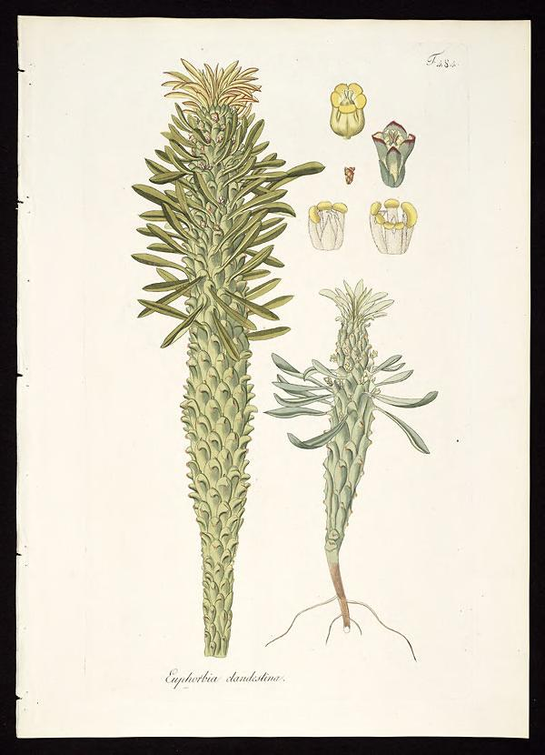 Plantarum rariorum horti caesarei Schoenbrunnensis descriptiones et icones /Opera et sumptibus Nicolai Josephi Jacquin.